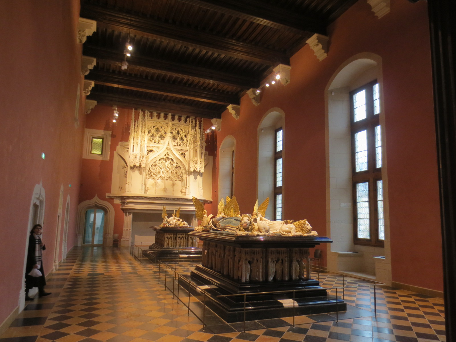 Tombeaux des Ducs de Bourgogne